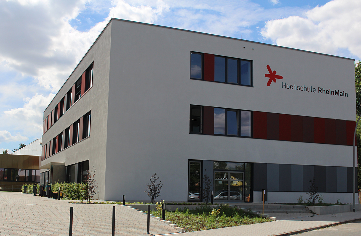 Das neue G-Gebäude wurde im Januar 2017 eingeweiht und steht seitdem den Studierenden der Hochschule RheinMain am Campus Am Brückweg in Rüsselsheim zur Verfügung.